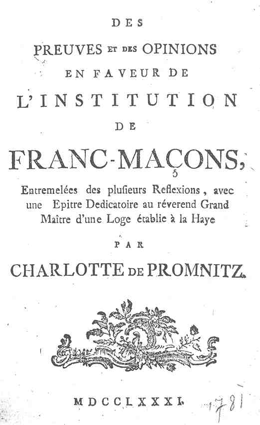 Frontispice du livre intitulé: Des preuves et des opinions en faveur de l'institution des Franc-maçons, Entremelées des plusieurs Reflexions, avec une Epitre Dedicatoire au réverend Grand Maître d'une Loge établie à la Haye par Charlotte de Promnitz MDCCLXXXI (1781).